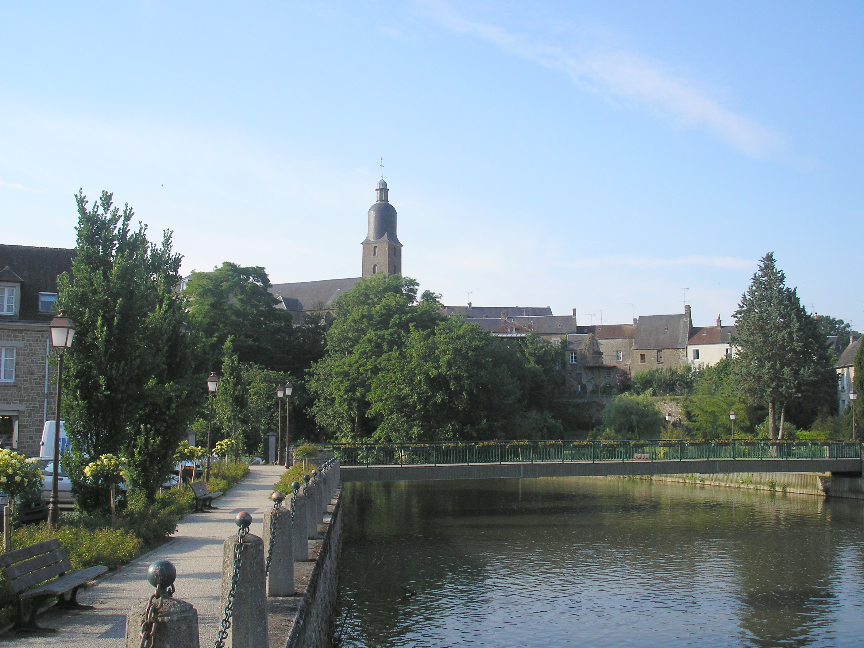 Putanges-Pont-Écrepin (Normandie, France). L'église et le bourg de Pont-Écrepin, vus des bords de l'Orne.